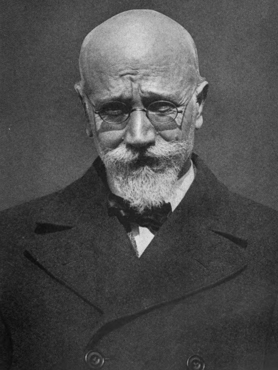 El político y primer ministro griego Elefterios Venizelos.